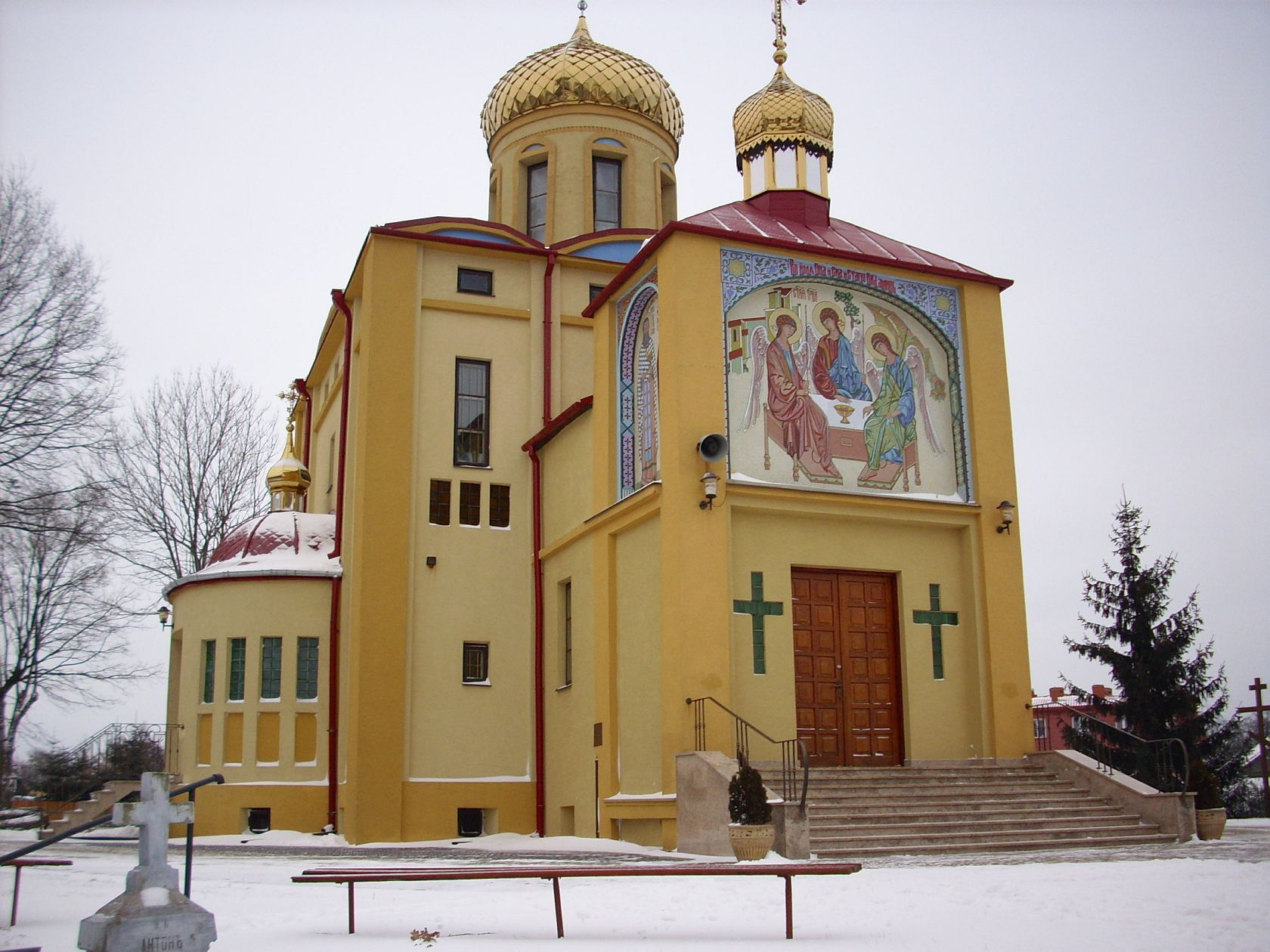 Cerkiew prawosławna pw. św. św. Cyryla i Metodego w Białej Podlaskiej przy ul. Terebelskiej 19.